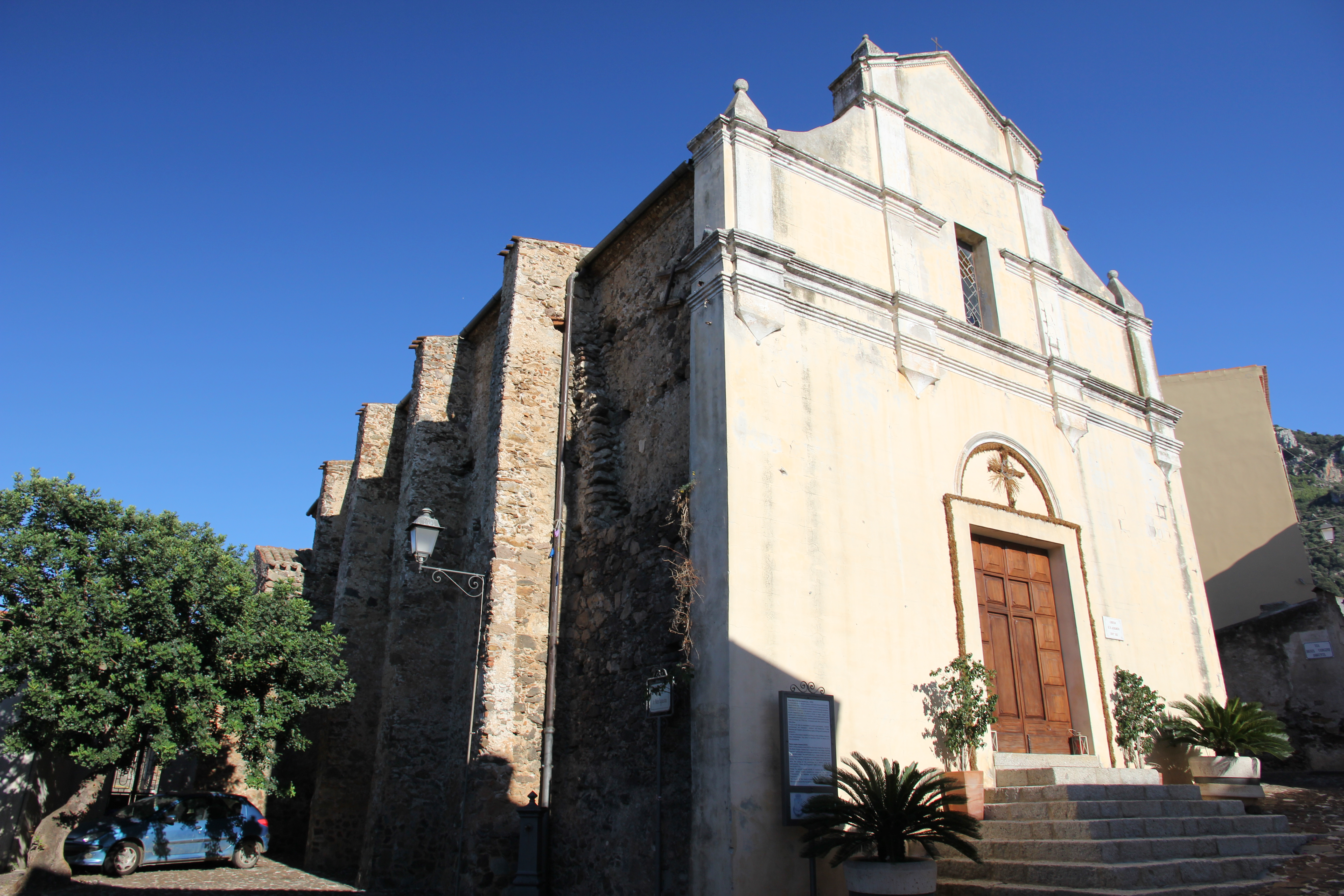 Galtellì - Chiesa della Beata Vergine Assunta